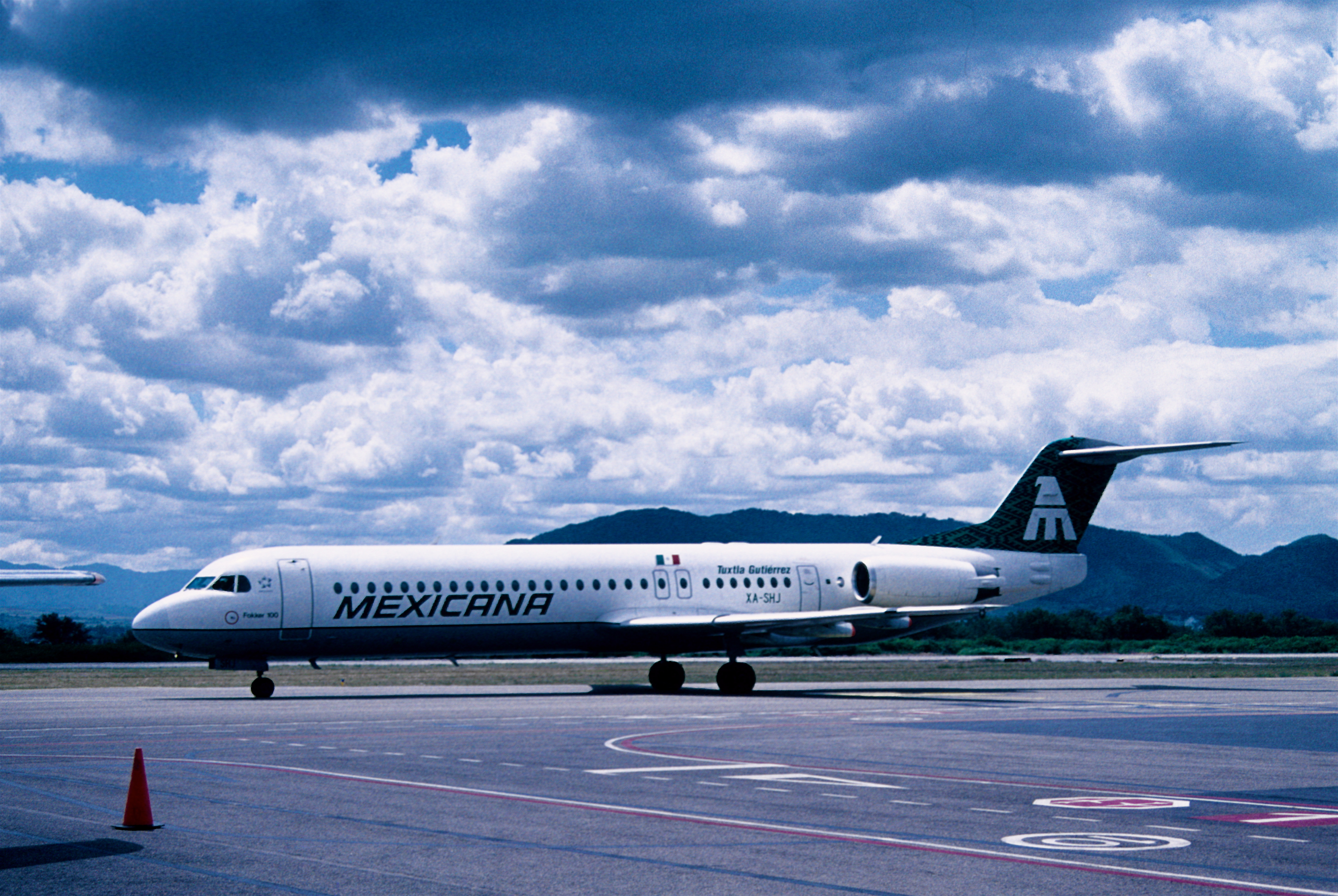 252ae - Mexicana Fokker 100; XA-SHJ@OAX;28.7.2003